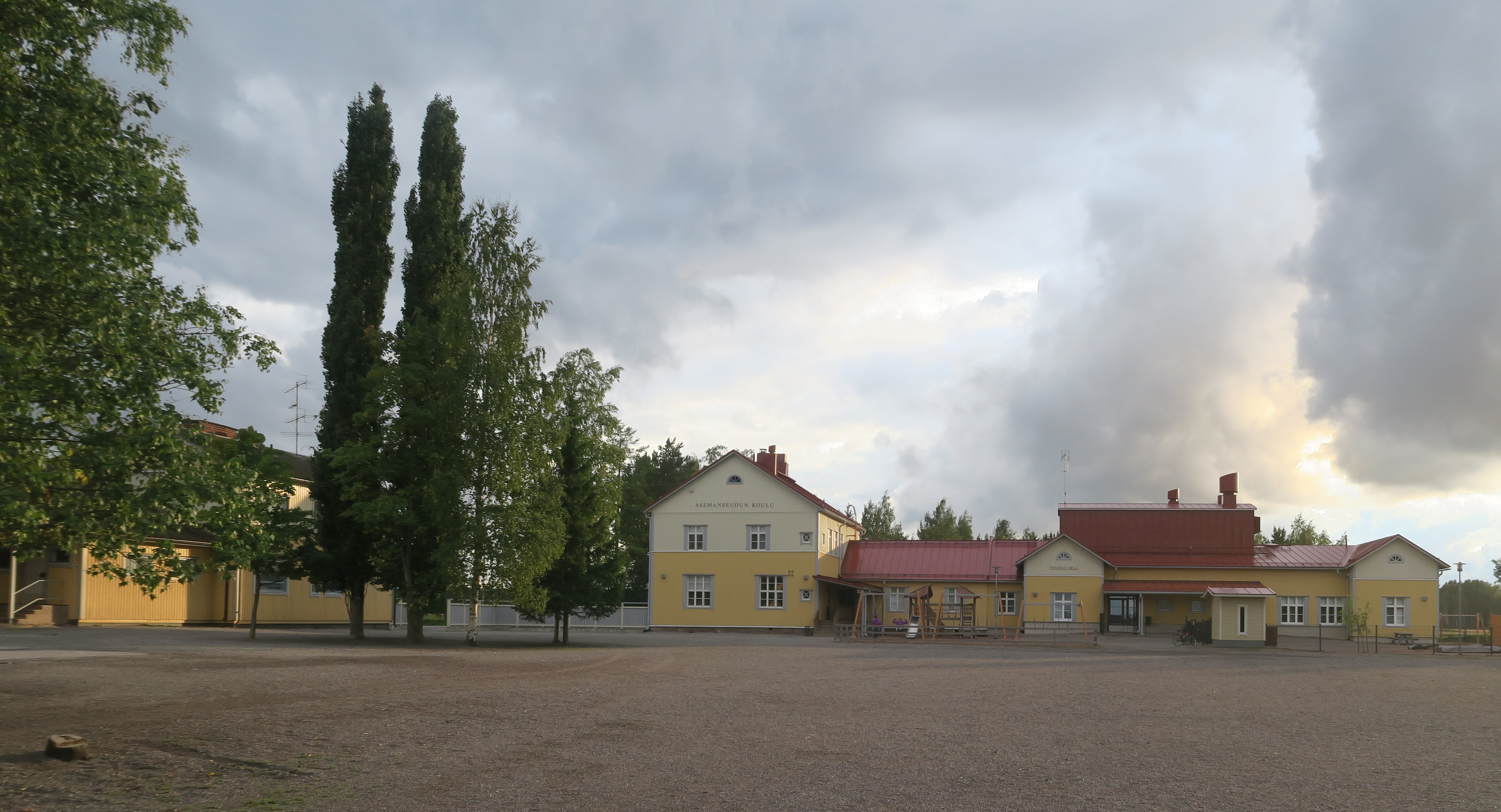 Asemanseudun koulu Mellilässä Loimaalla